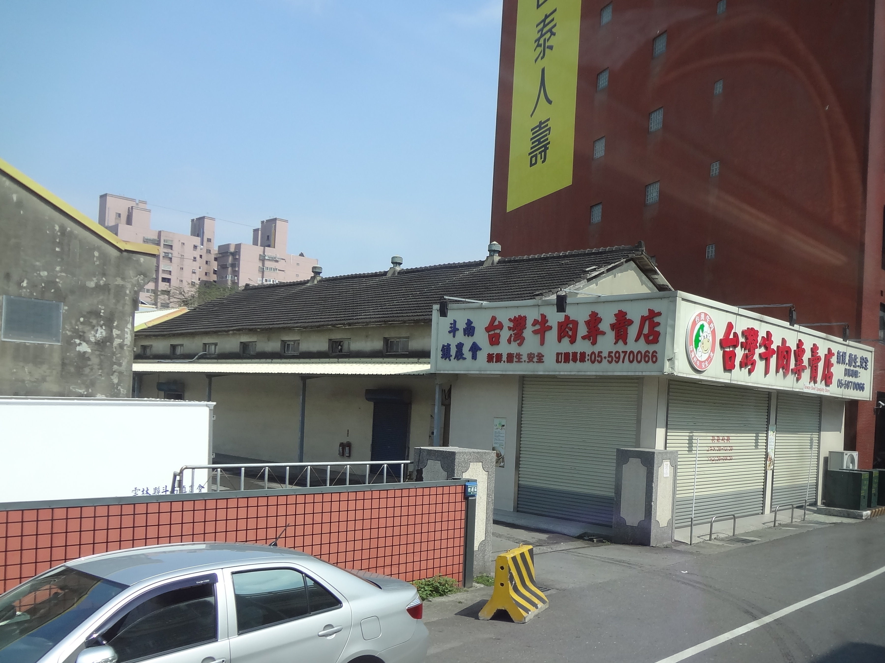 中文（台灣）: 斗南鎮農會台灣牛肉專賣店，地址：雲林縣斗南鎮大同路10號。本照片係於遊覽車上拍攝。